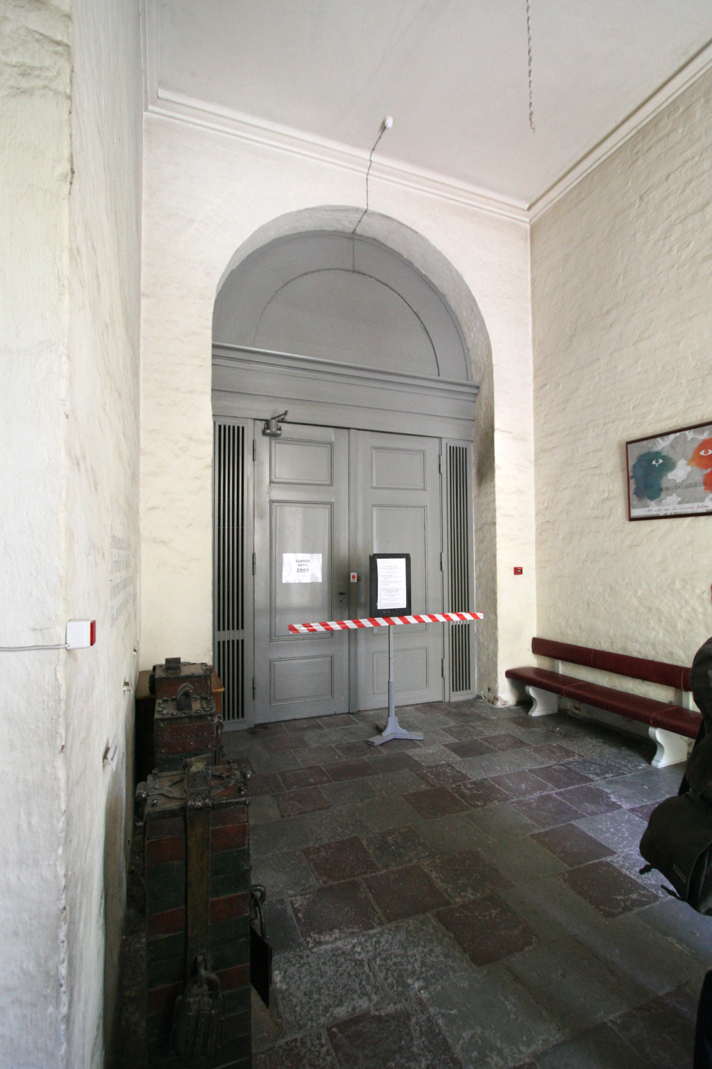 Vor Frelser Kirke (Church of Our Saviour), Copenhagen, Denmark. Porch.